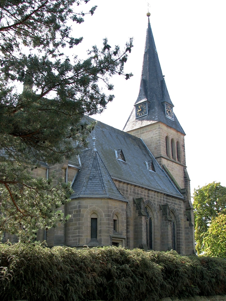 Kirche von Salzgitter-Beinum. Die Kirche wurde am 9. August 1891 eingeweiht.